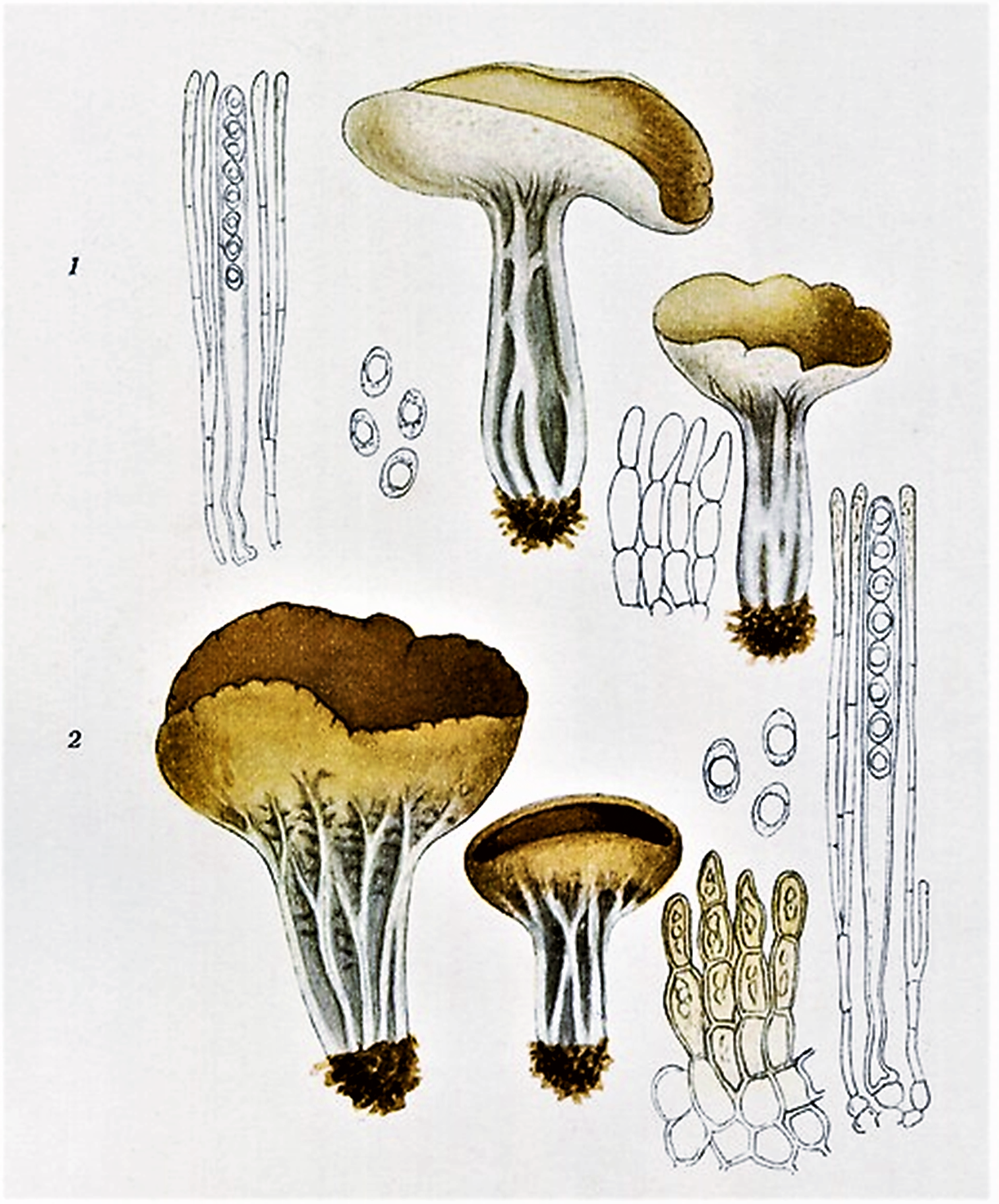 Giacomo Bresadola: Acetabula sulcata (Pers., 1801) Fuckel (1870) und Acetabula vulgaris Fuckel (1870), heute Helvella acetabulum (L., 1753) Quél. (1874)